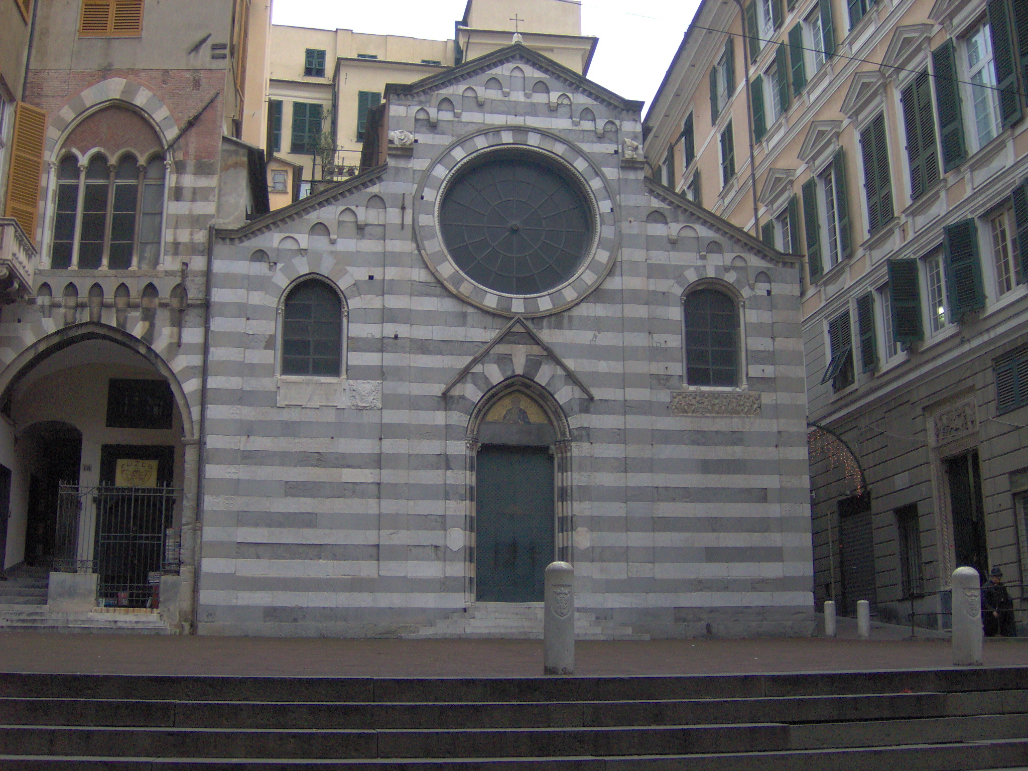 La chiesa di San Matteo a Genova (piazza San Matteo, Genova).